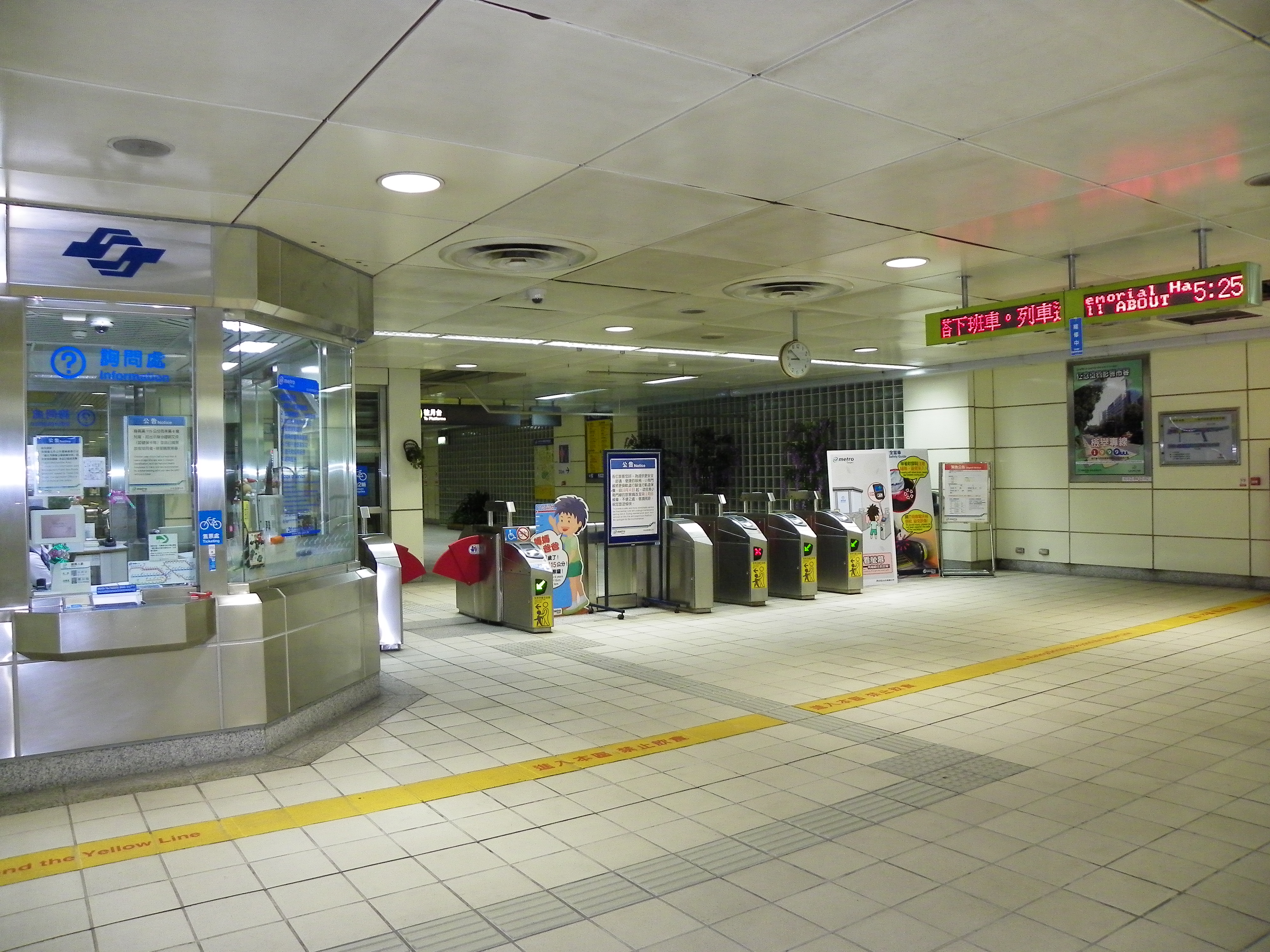 台北捷運小南門線小南門駅の南改札口と案内所。